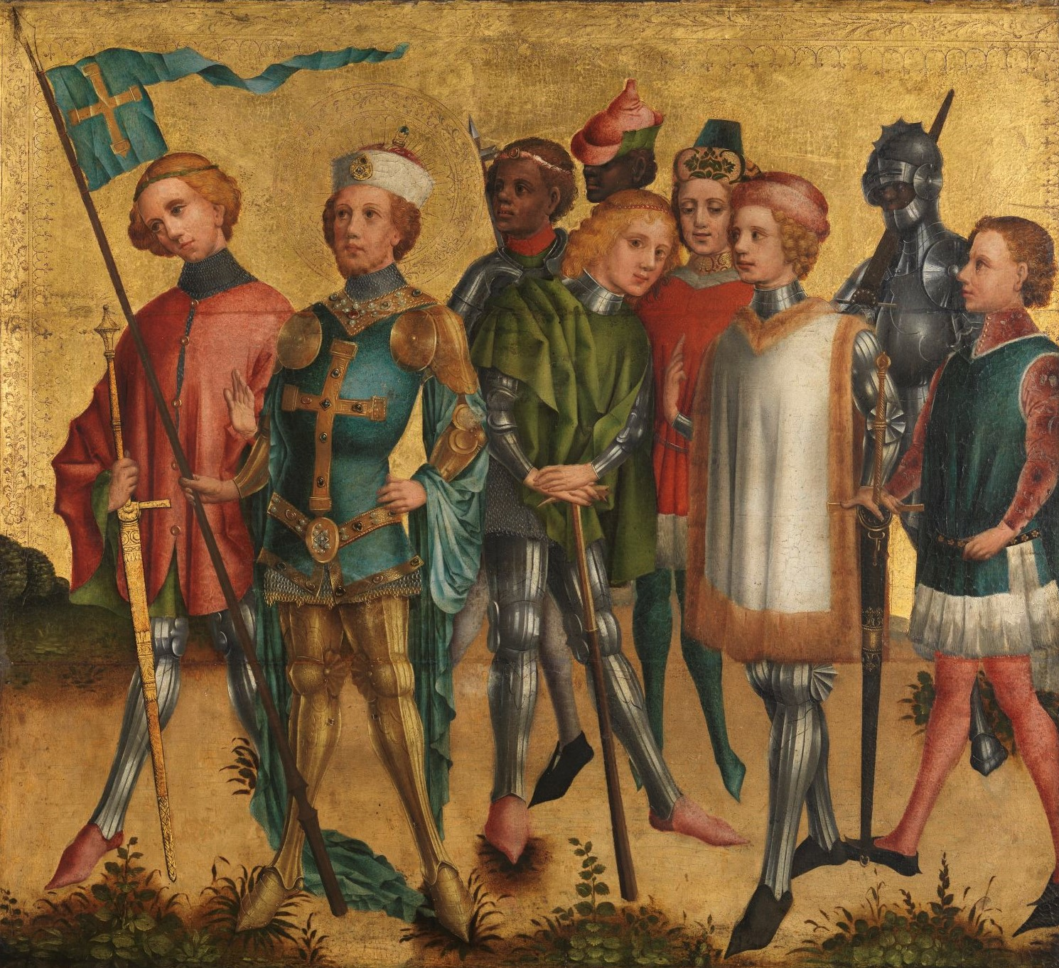 Heiliger Gereon mit Gefolge, Köln, um 1460, im Germanischen Nationalmuseum in Nürnberg.